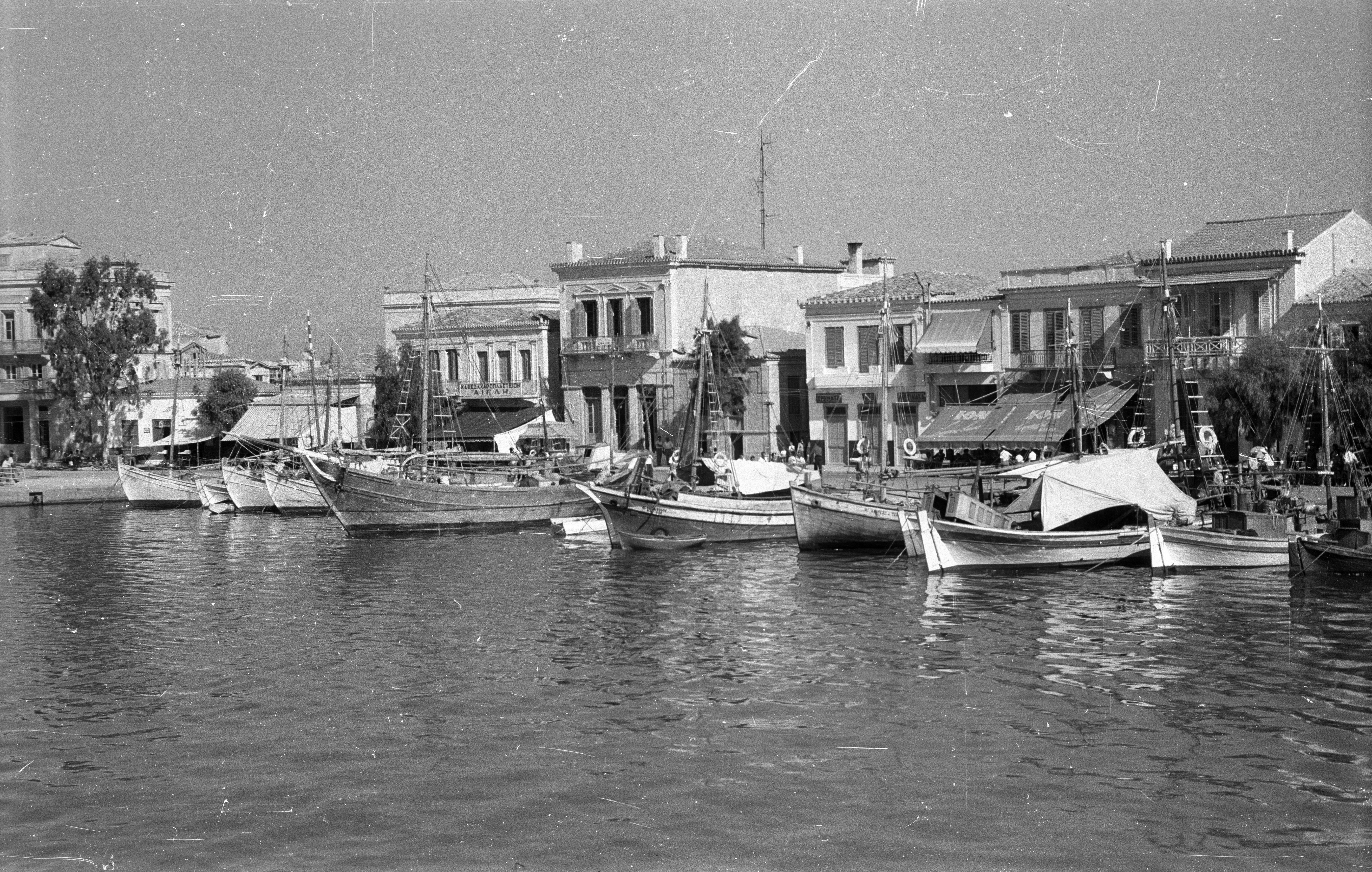 kikötő. Location: Greece, Aegina Tags: sailboat, Greek alphabet, awning Title: kikötő.